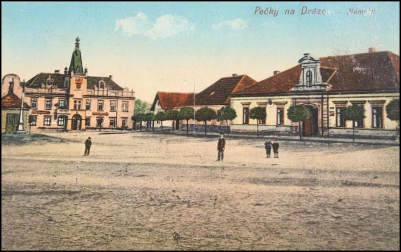 rodny dum Vaclava Stepana